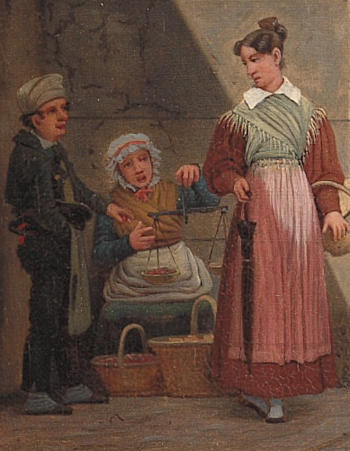 Udsnit af Martinus Rørbyes maleri: Arrestbygningen ved råd- og domhusetDepicted place: (55°40′36″N 12°34′20″E / 55.676734°N 12.572104°E)